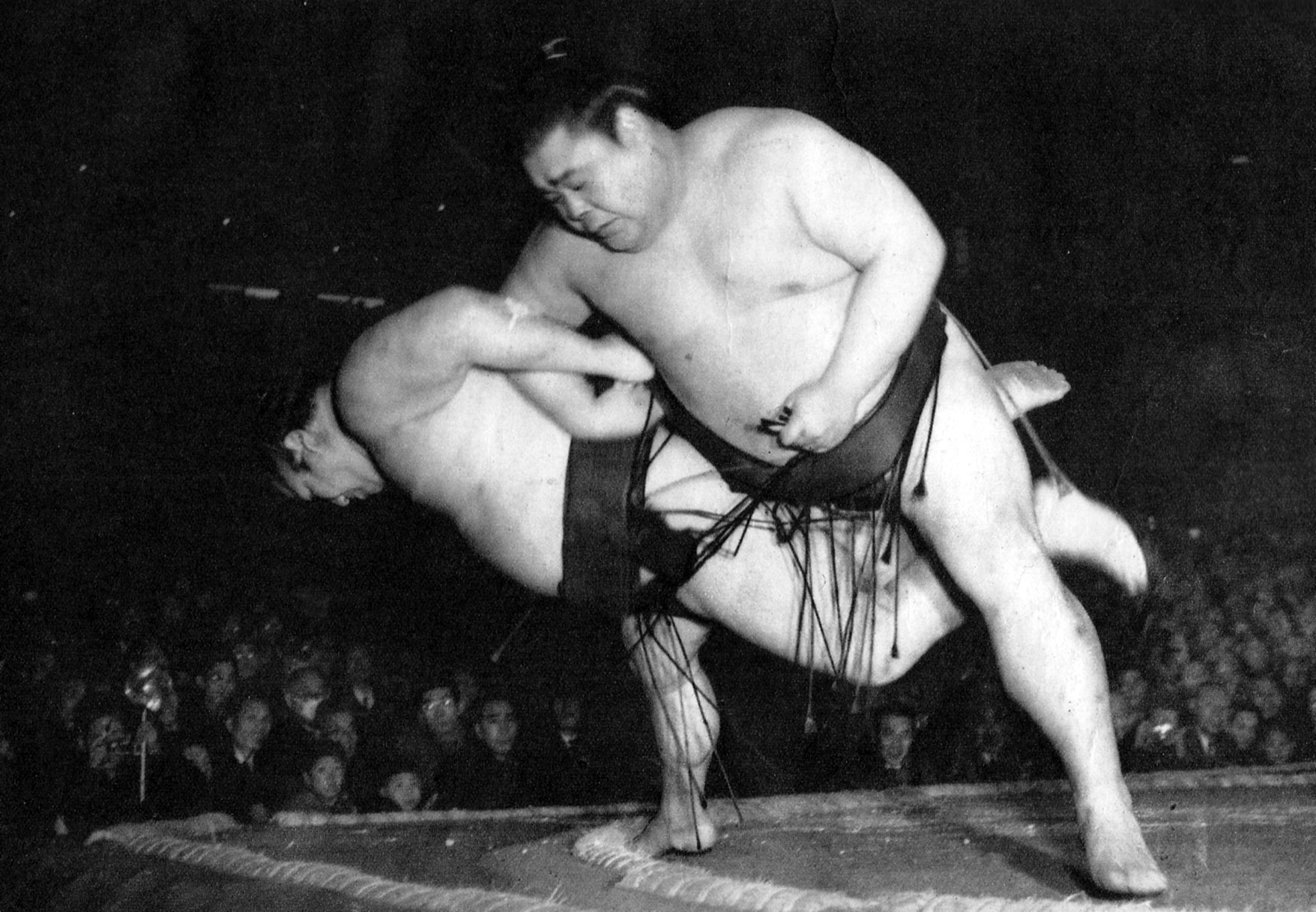 昭和28年（1953年）初場所8日目、三根山が上手投げで名寄岩に勝利した瞬間。蔵前国技館にて撮影。